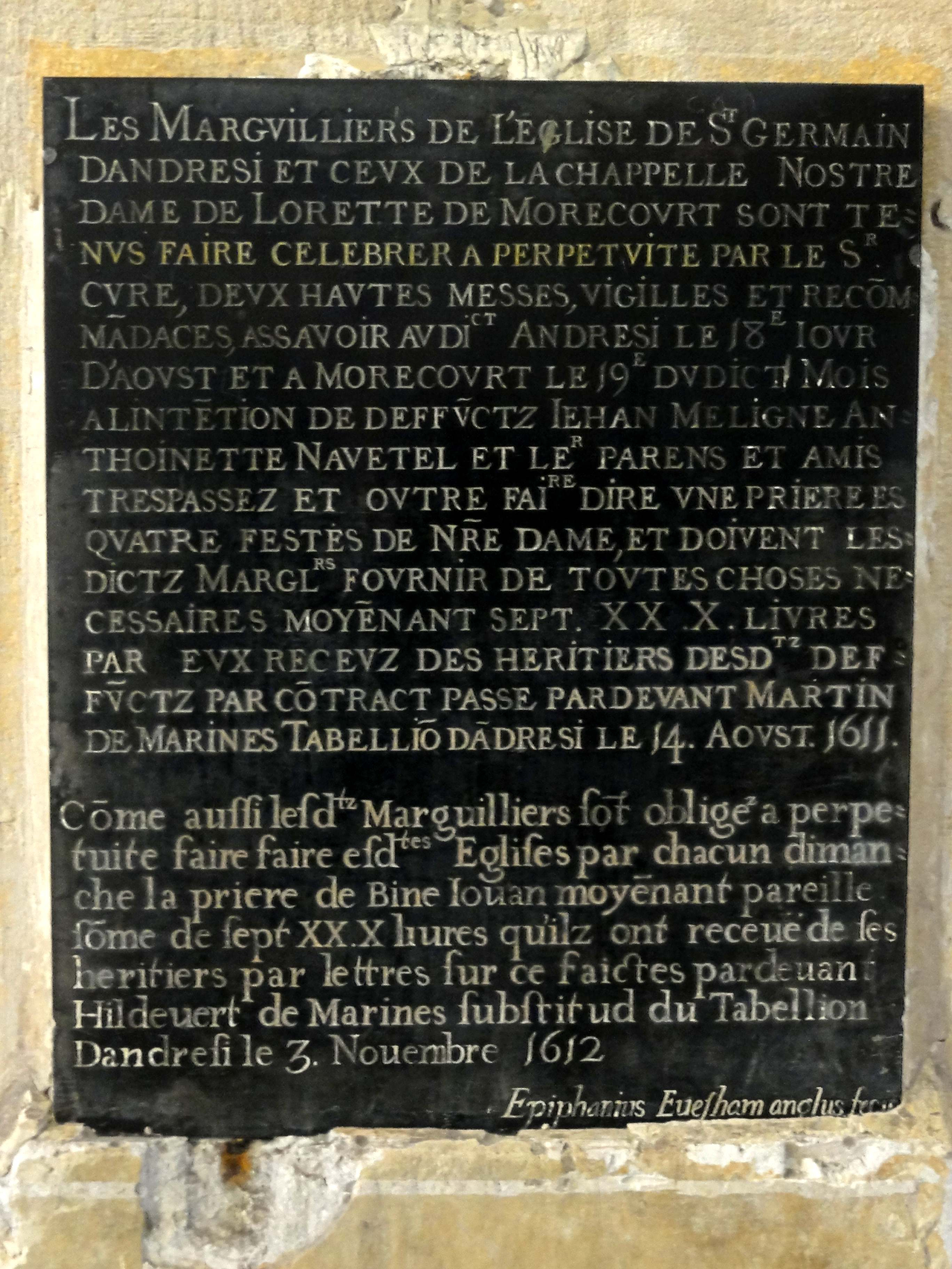 Plaque de fondation.